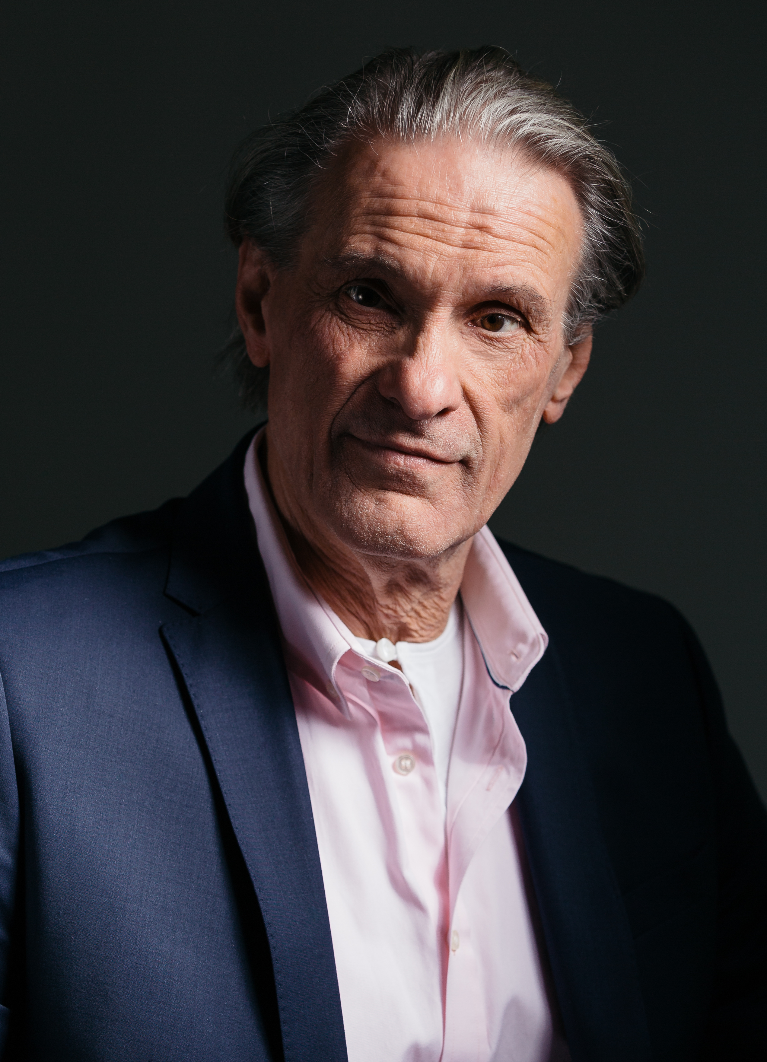 Clemens Aap Lindenberg fotografiert von Katrin Nusterer